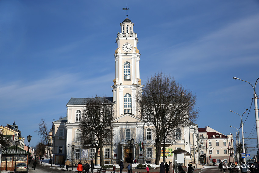 Віцебск.